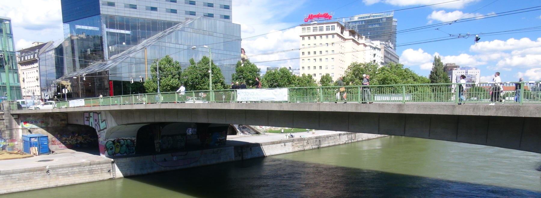 Schwedenbrücke über den Wiener Donaukanal zwischen dem 1. und 2. Wiener Gemeindebezirk